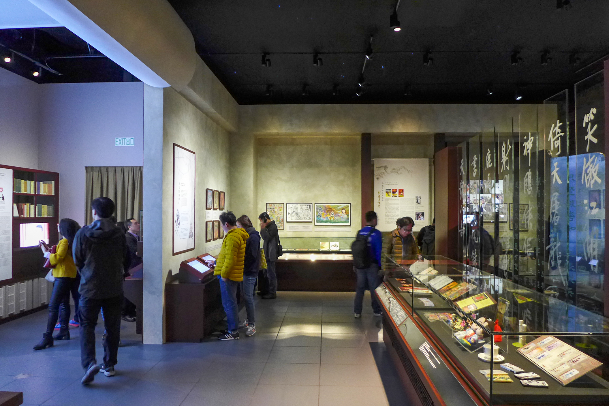 Hong Kong Heritage Museum Jin Yong Gallery